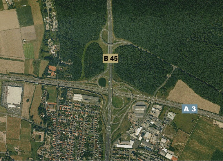 Die B 45 kreuzt die A 3 in Rodgau - Luftaufnahme aus 400 m Höhe - 2005 - Bürger-GIS Kreis Offenbach